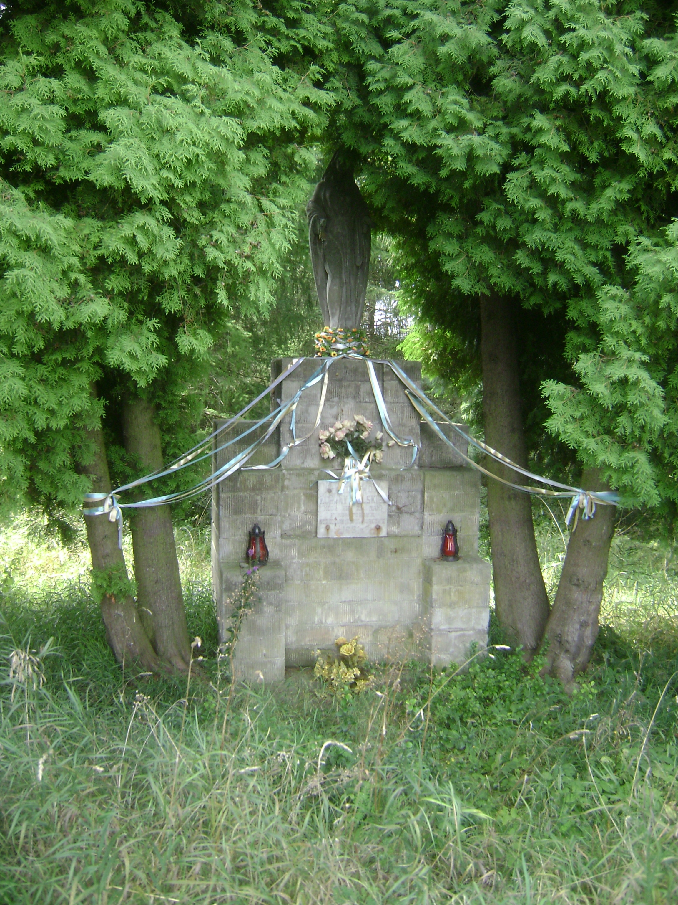 Podłęcze